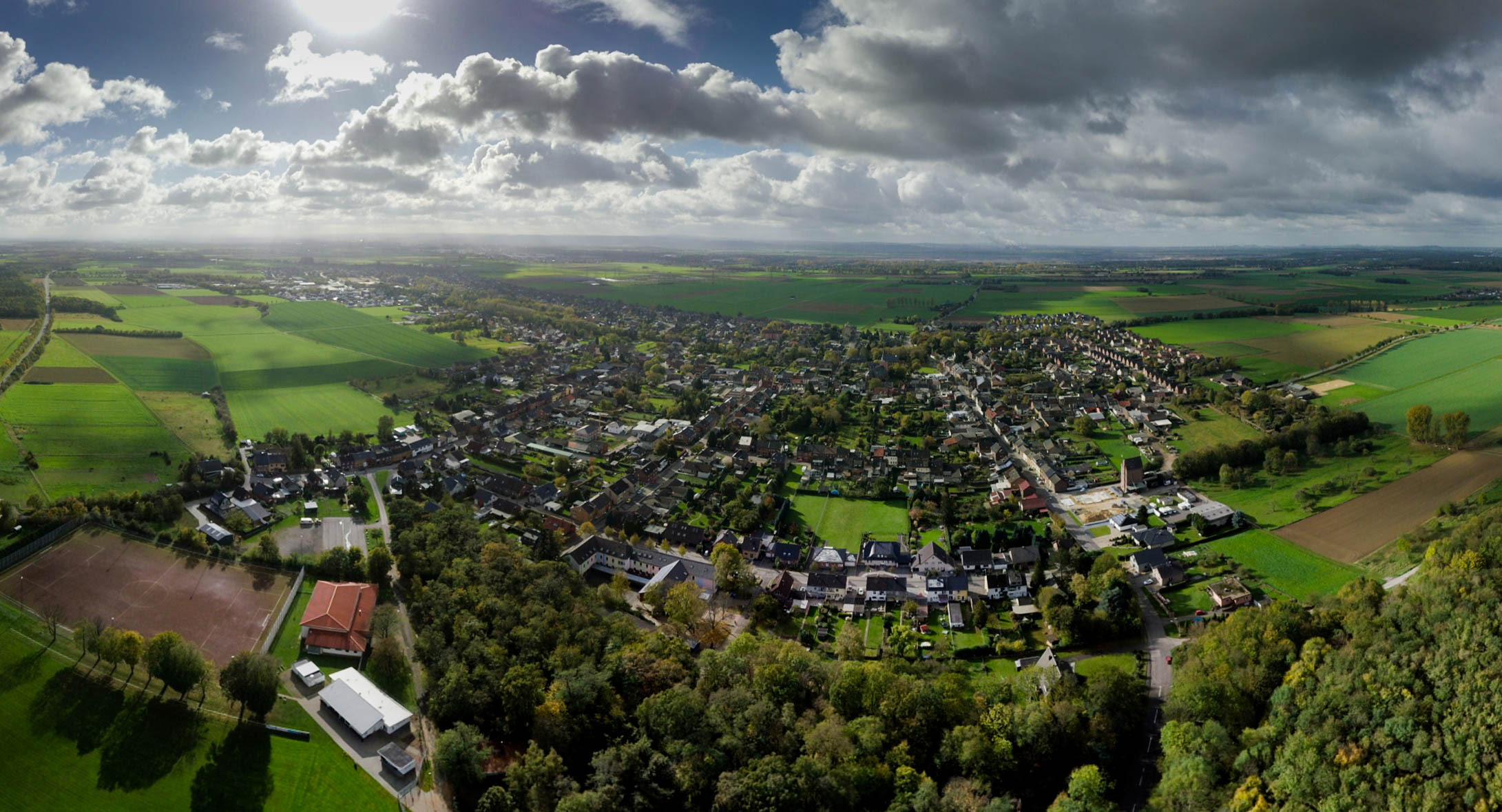 Die Gemeinden Nieder- und Oberzier (links) liegen unmittelbar am Braukohletagebaugebiet von Hambach. Die Dörfer nordöstlich von Niederzier fielen dem riesigen Kohleabbaugebiet zum Opfer. Ganz links im Bild ist die Ortschaft Ellen zu sehen. Aufgenommen mit einer Fotodrohne.